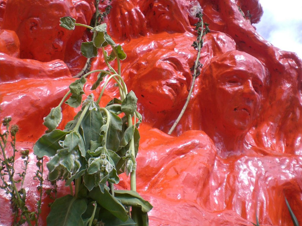 La Colonne de l'Infamie peinte en orange (Université de Hong Kong - 2008)